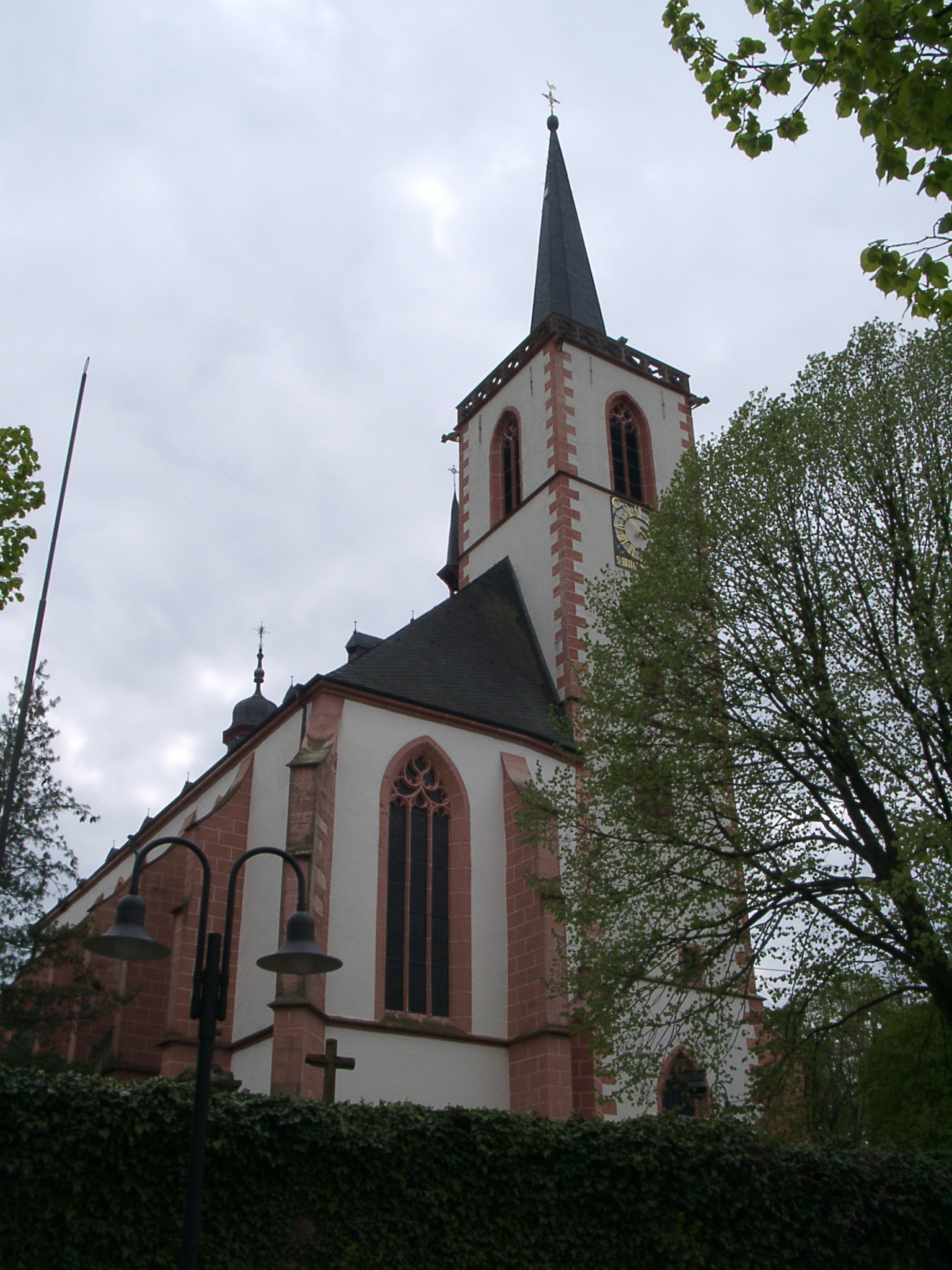 Wallfahrtskirche Klausen